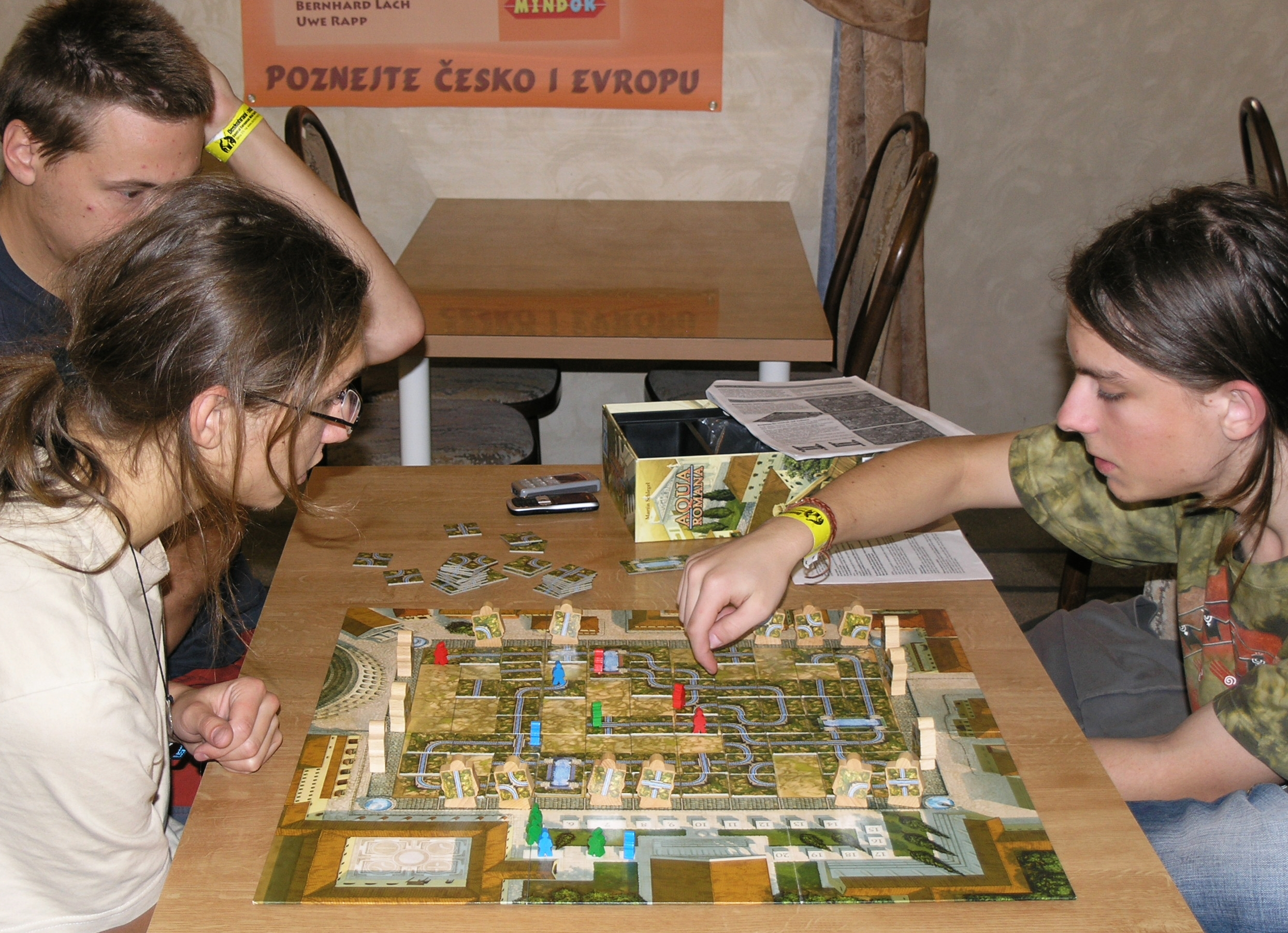 Deskohraní 2008